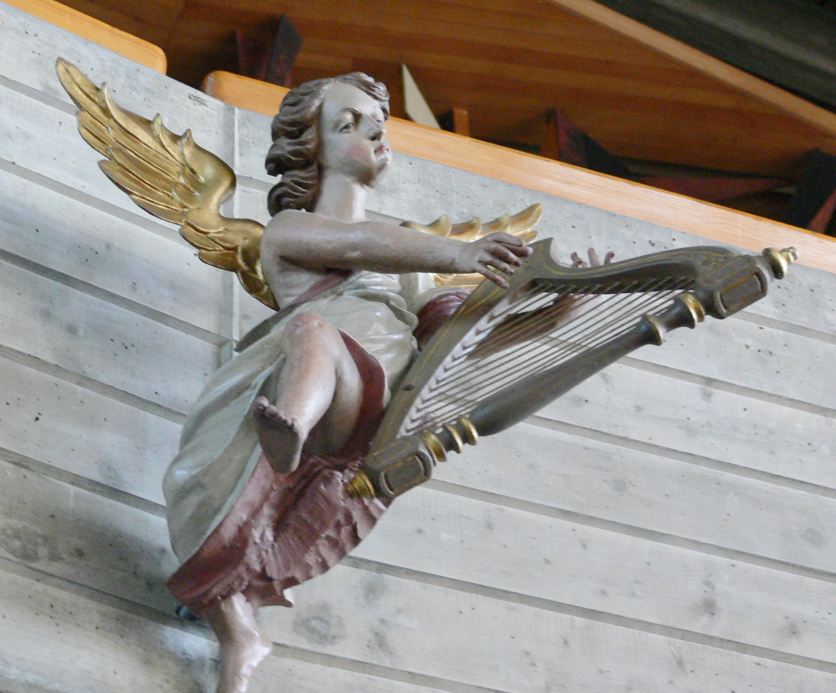 Marienkirche (Kath. Pfarrkirche St. Maria), Weingarten/Württemberg, erbaut 1958–1960 Harfenspielender Engel an der Empore